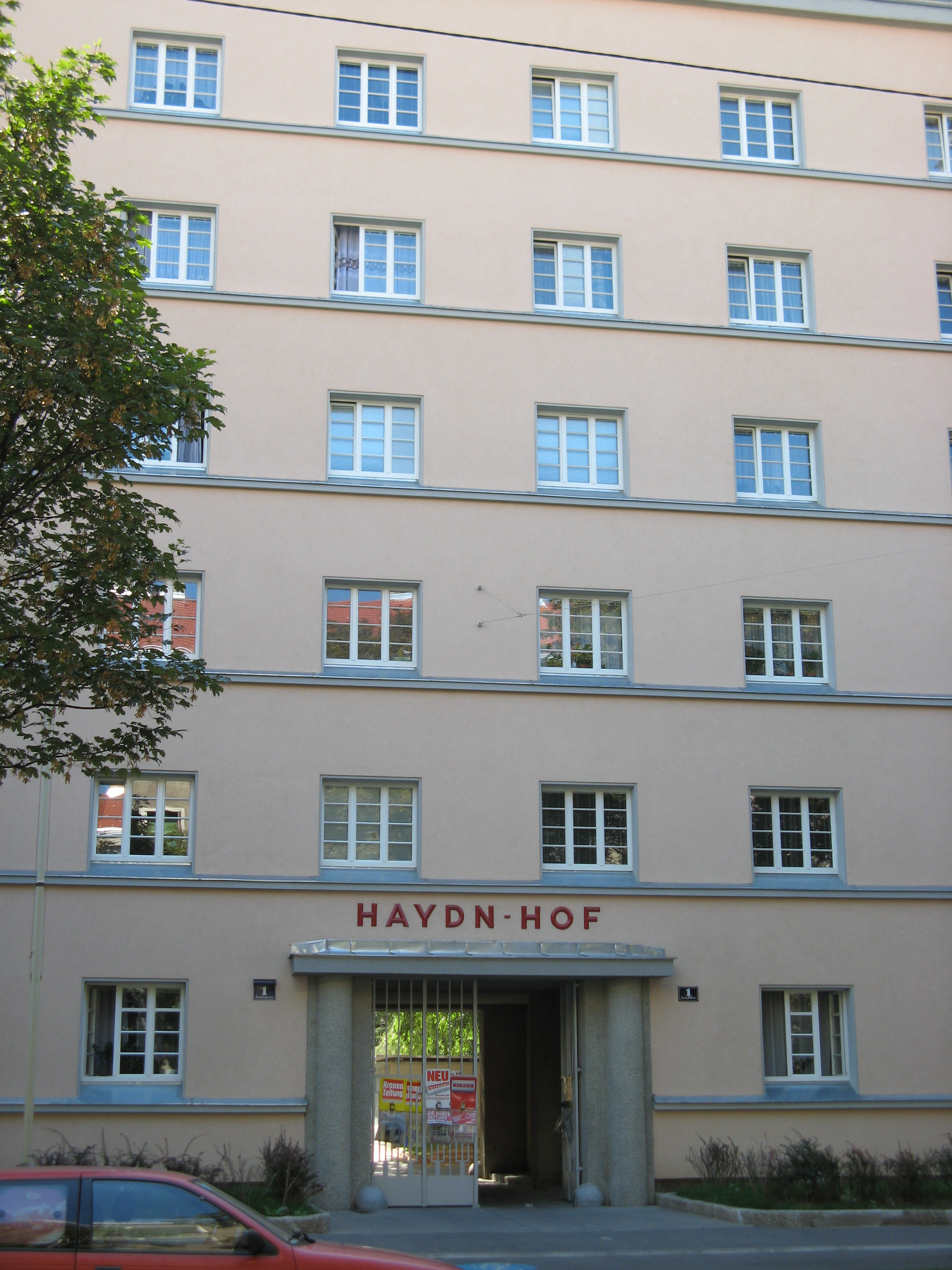 Wohnhausanlage Haydnhof von A. Hauser, 1928-29, in Wien-Meidling, Seite zur Arndtstraße